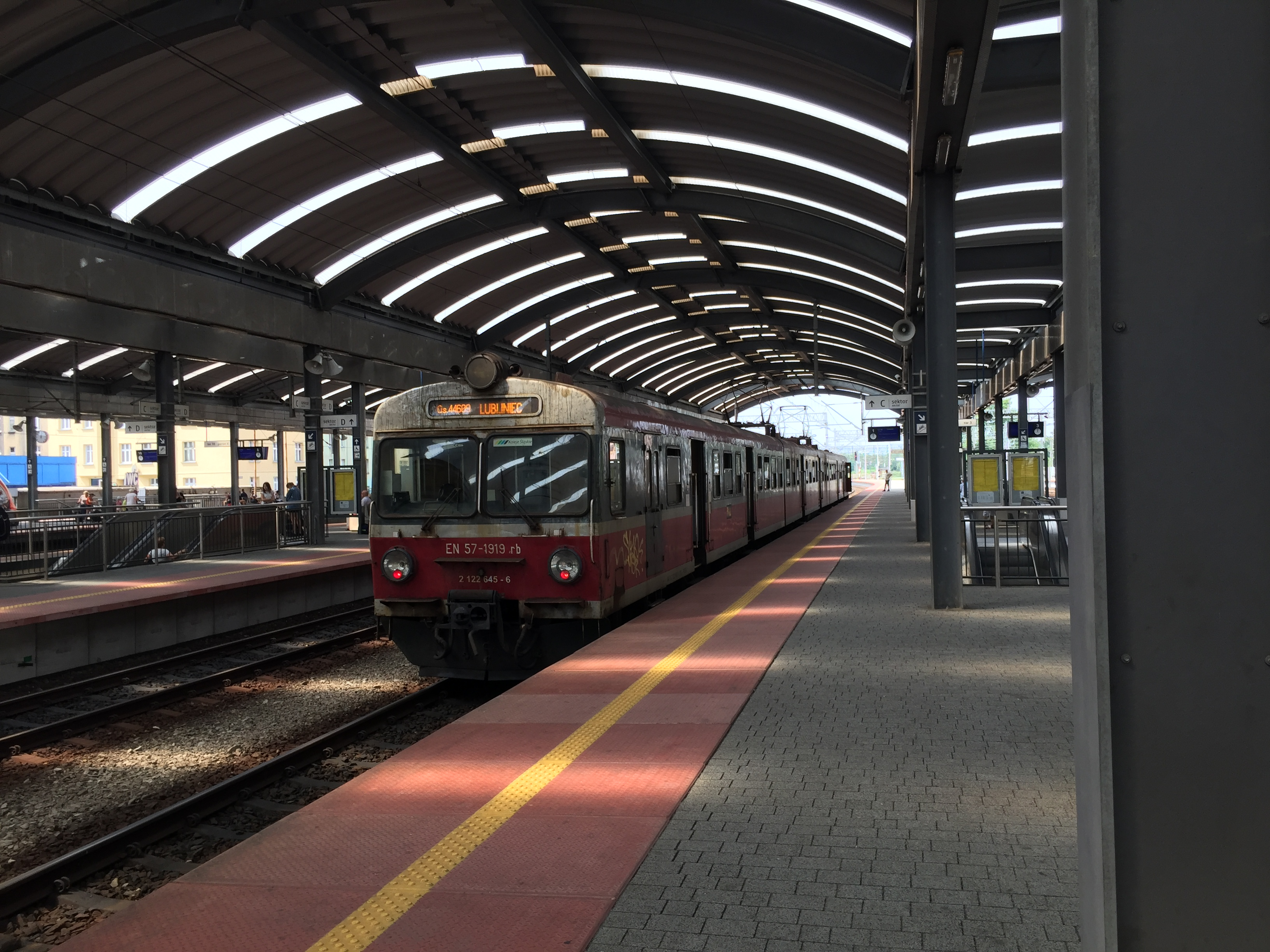 EN57 na peronie katowickiej stacji w 2018 roku